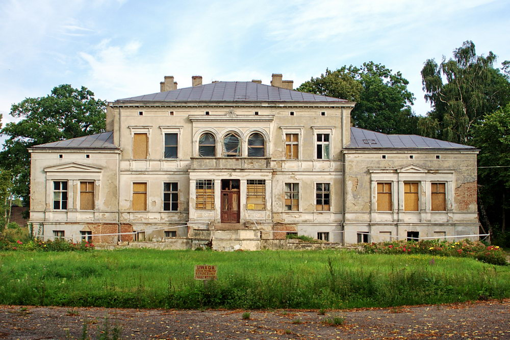 Dargosław - pałac (zabytek nr 67)